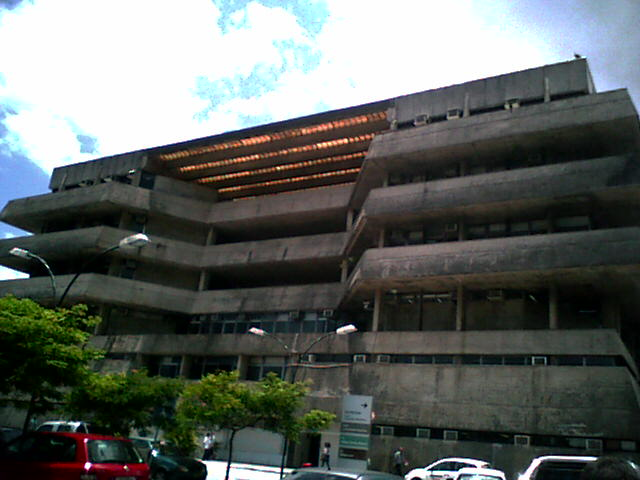 Um dos três prédios da Assembléia Legislativa da Bahia.